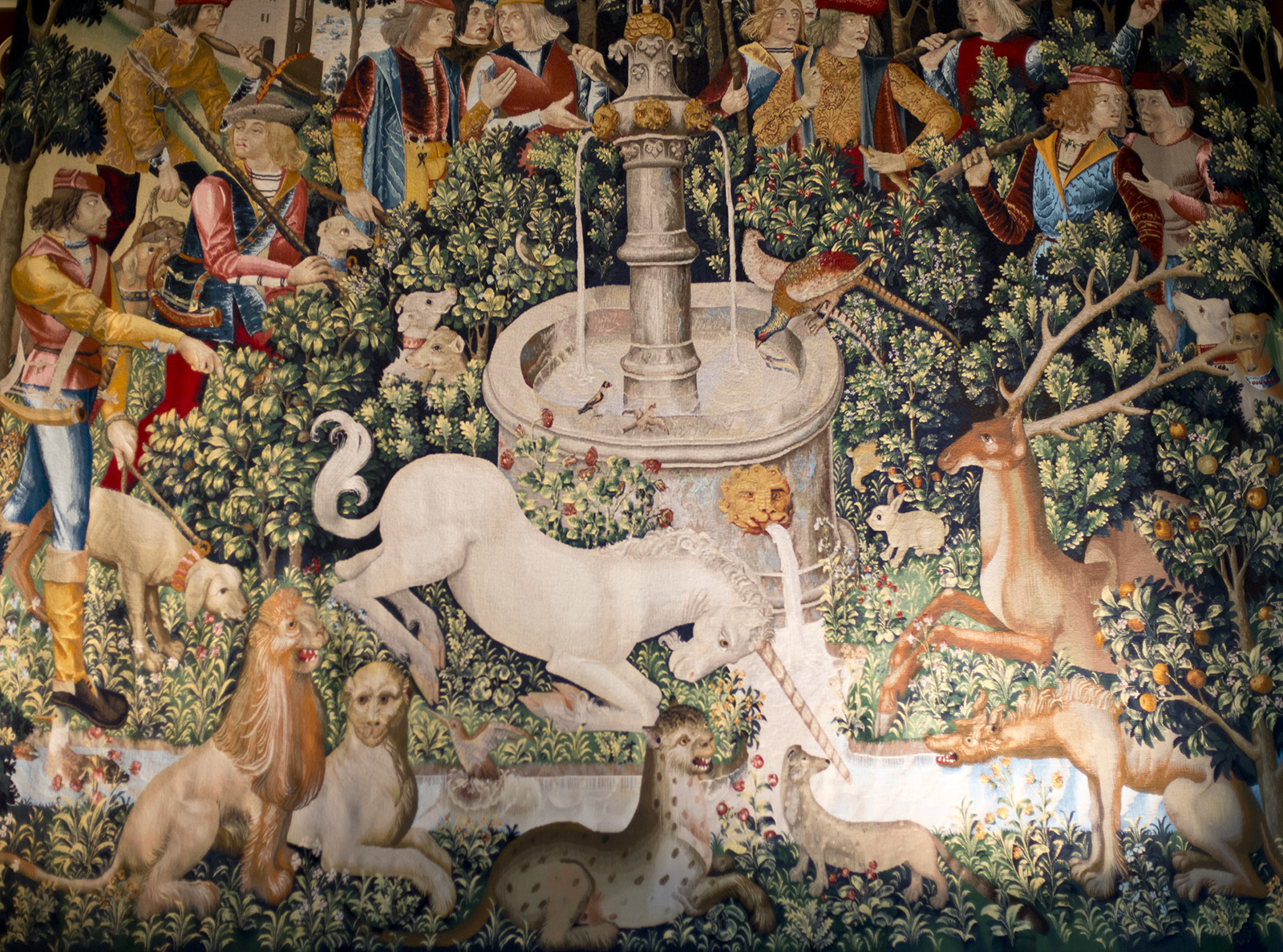 Sterling Castle